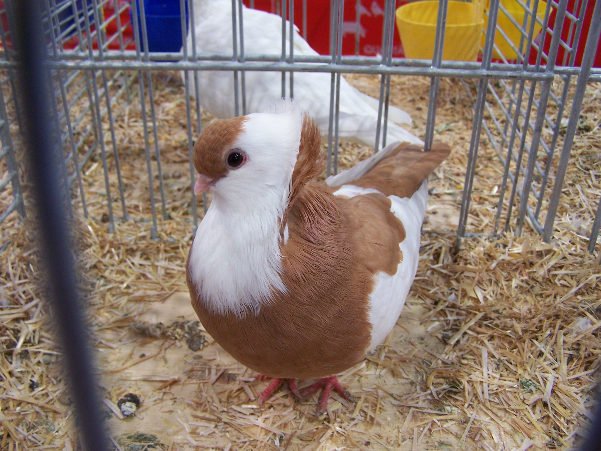 Felegyhazer geel geekstert